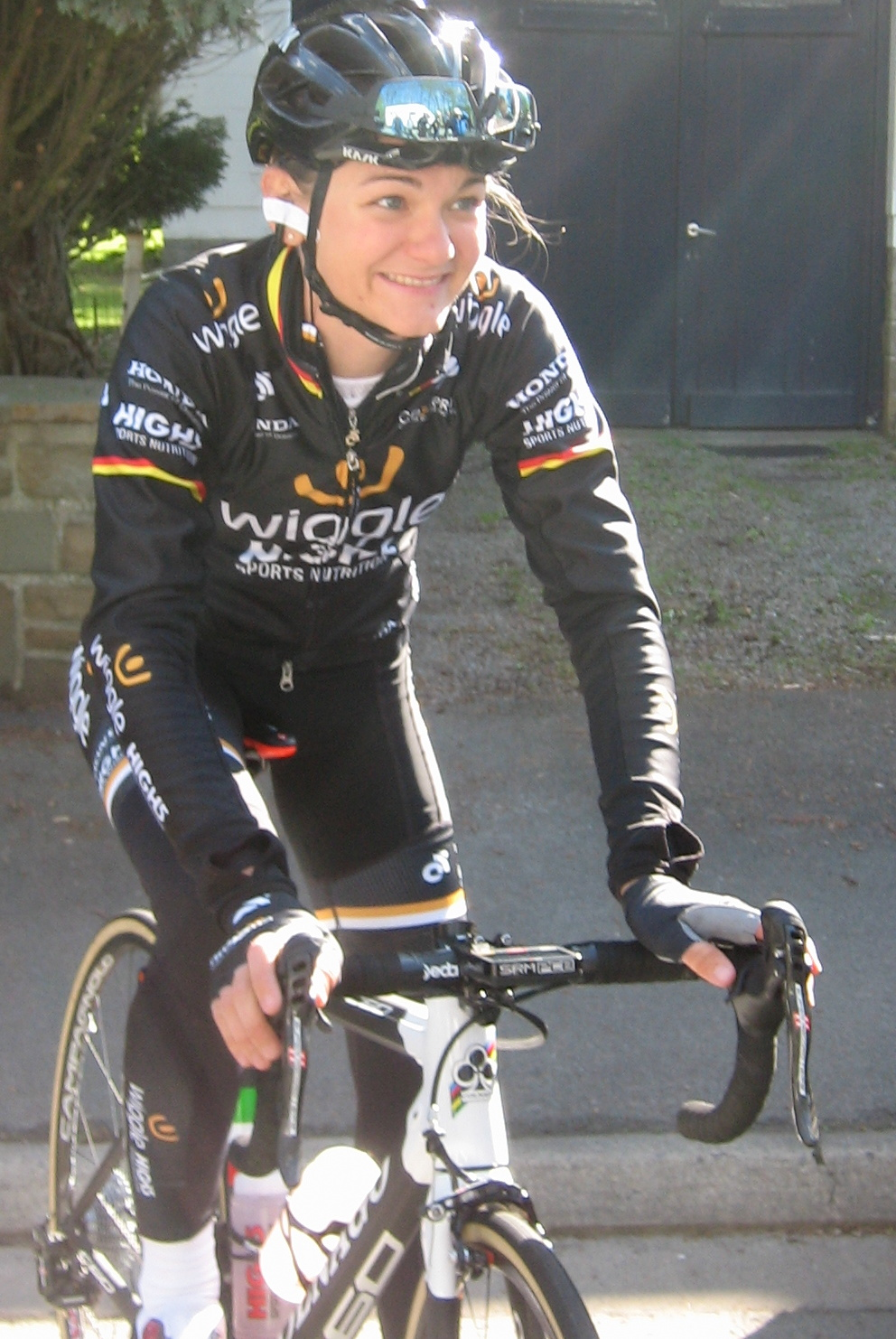 Start van de Waalse Pijl 2017 in Huy.